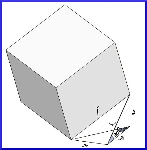 توضيح كيف تمت عملية تحليل المركبات